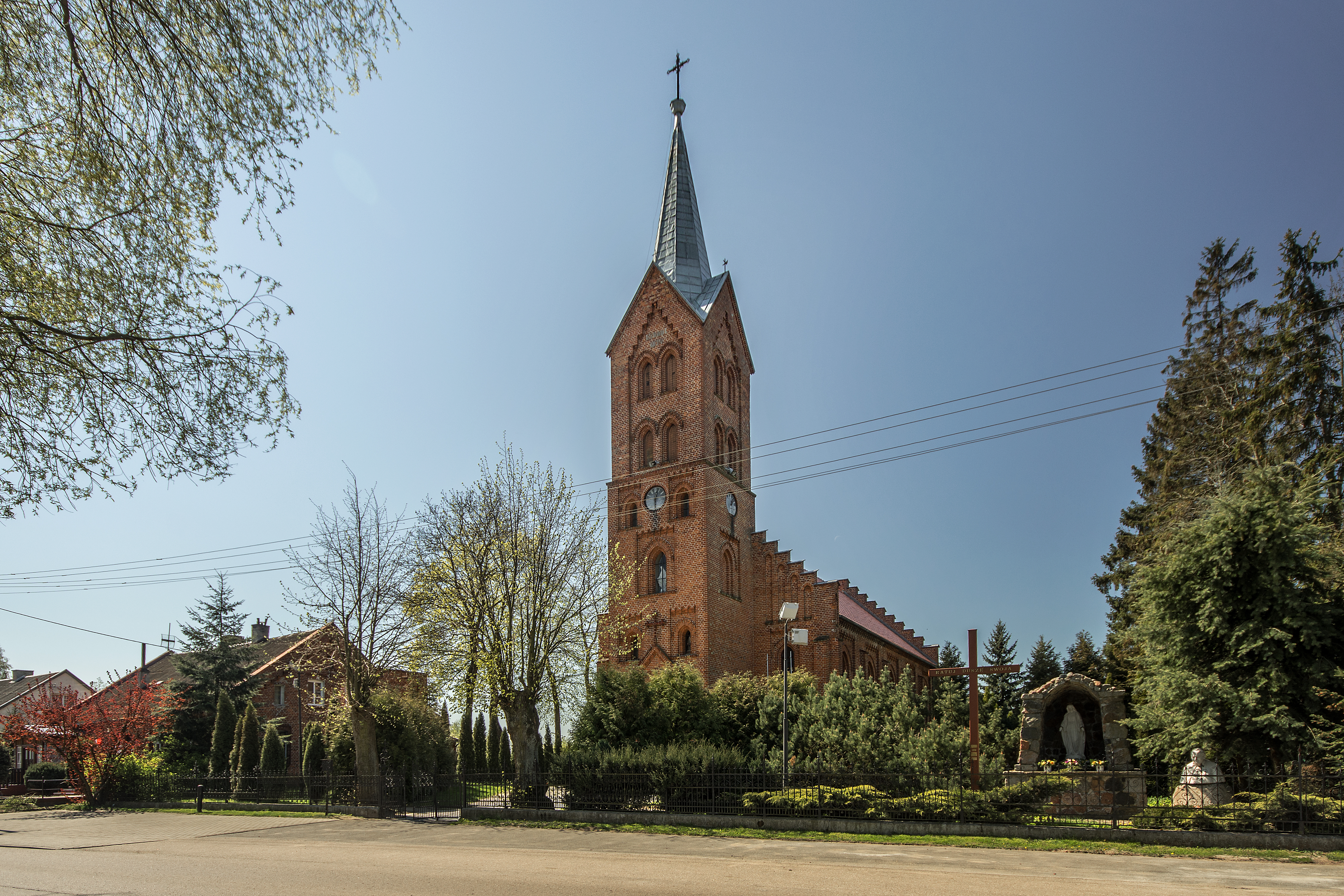 Ostaszewo, kościół ewangelicki, ob. rzym.-kat. par. p.w. św. Jana Chrzciciela, 1873-1874